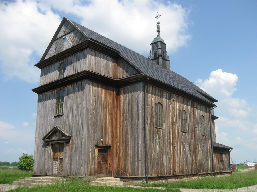 Cibory-Kołaczki, kościół filialny p.w. Narodzenia NMP